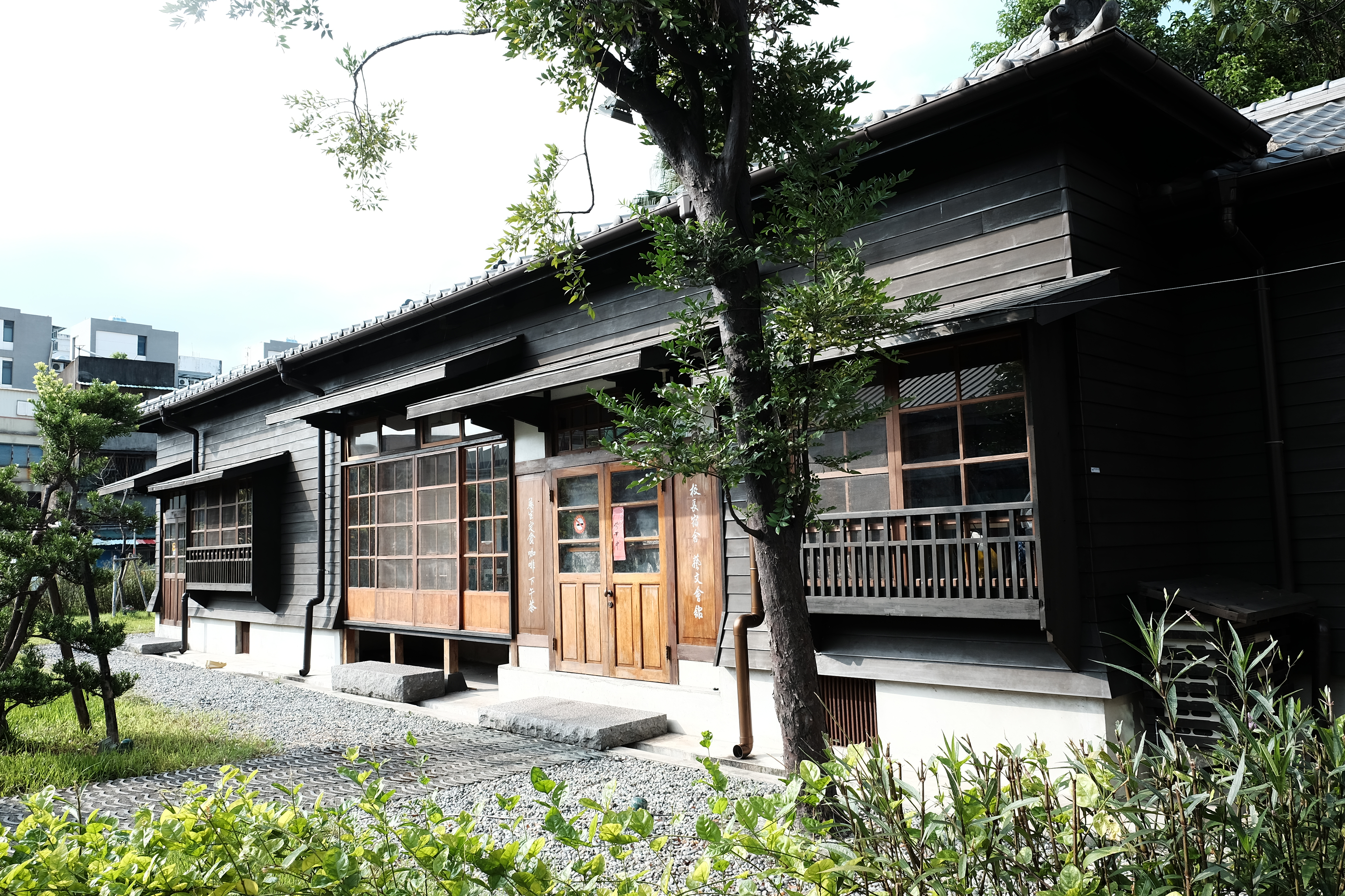 2016年羅東鎮成功國小校長宿舍